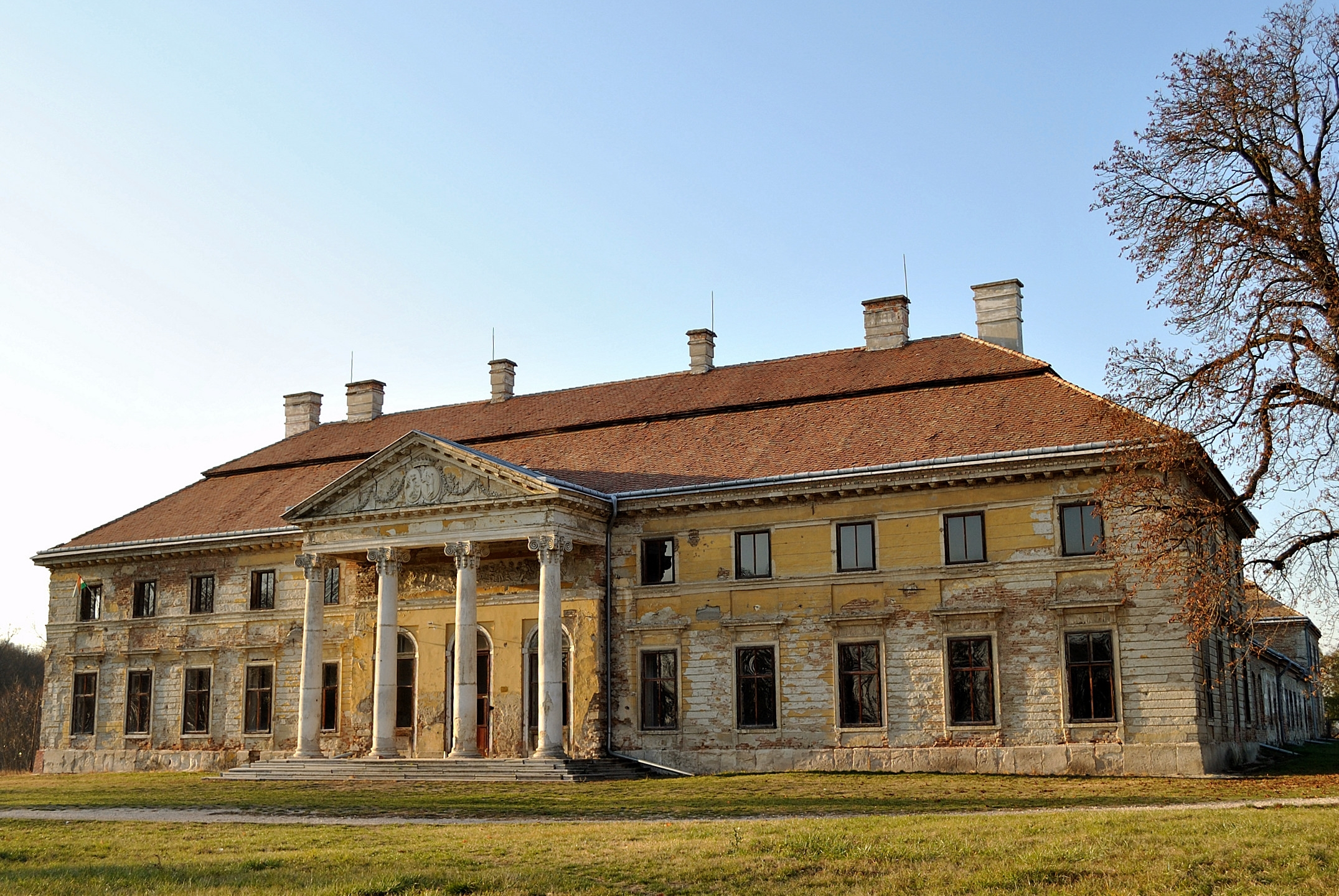 Cziráky-kastélyegyüttes, kápolna és kastélypark This is a photo of a monument in Hungary. Identifier: 3672